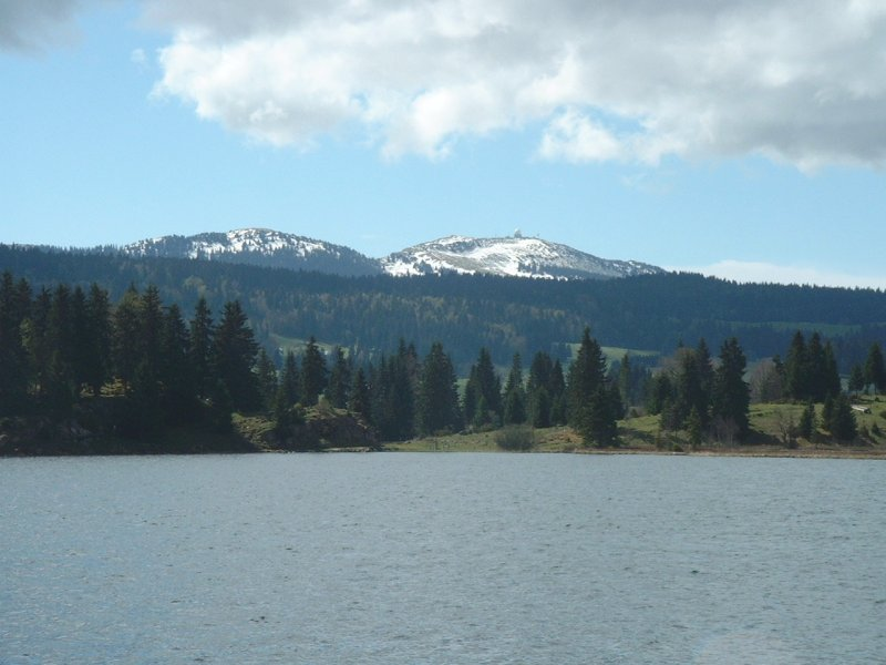 Le lac des Rousses et la Dole